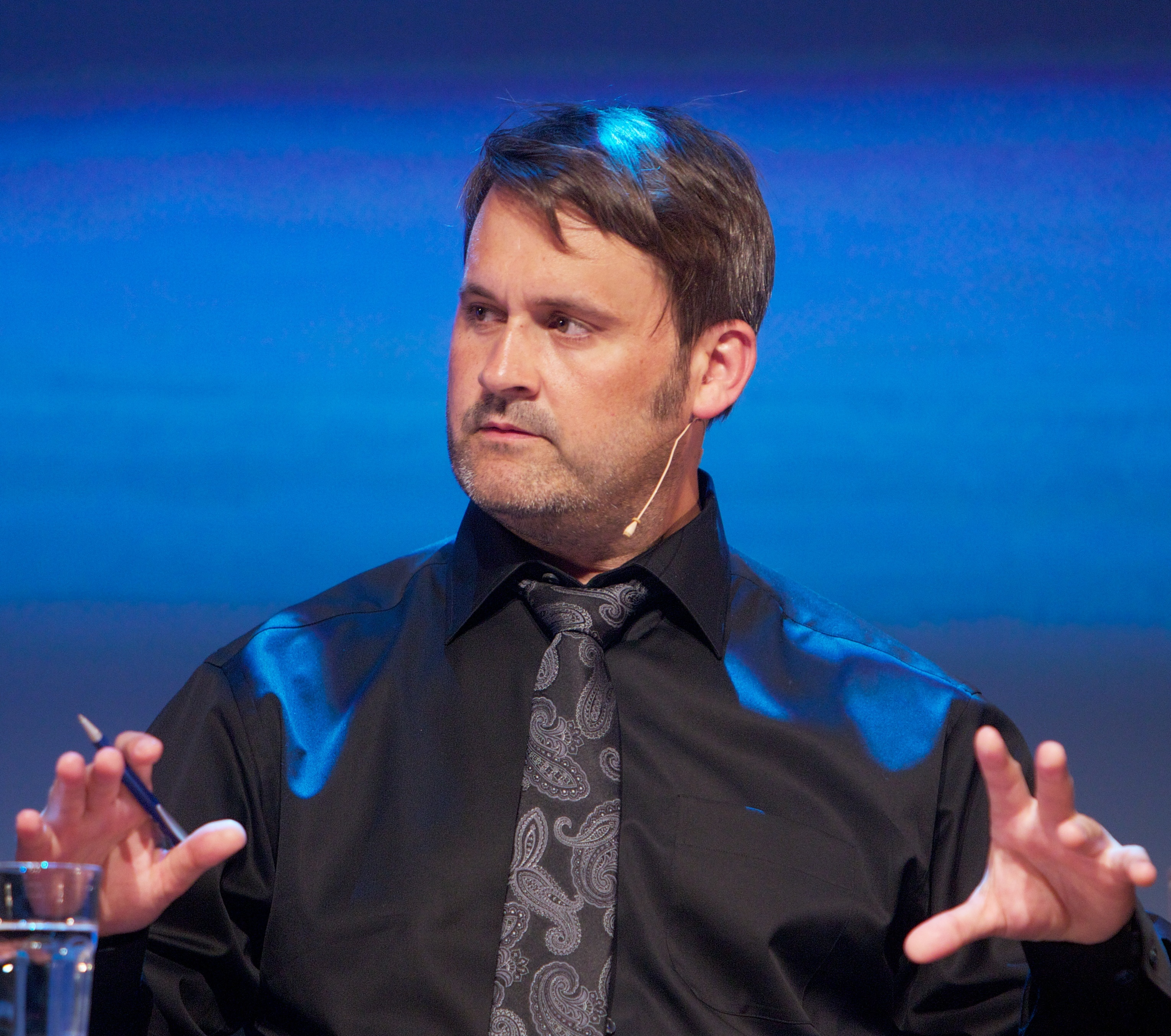 Thomas Seltzer med Trygdekontoret Mediespessial. Bergen, 20110512. Nordiske Mediedager, torsdag. Foto: Eirik Helland Urke